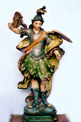 Interior da Igreja Matriz de Nossa Senhora do Rosáro, Pirenópolis.